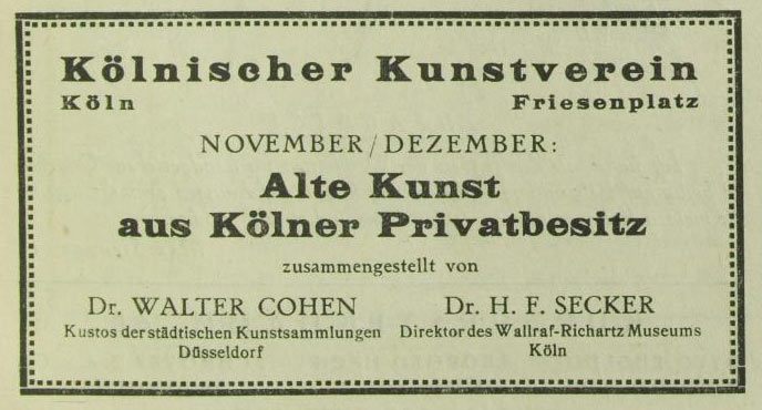 Anzeige des Kölnischen Kunstvereins vom Dezember 1922, erschienen in der Weihnachtsausgabe der Zeitschrift "Der Querschnitt".